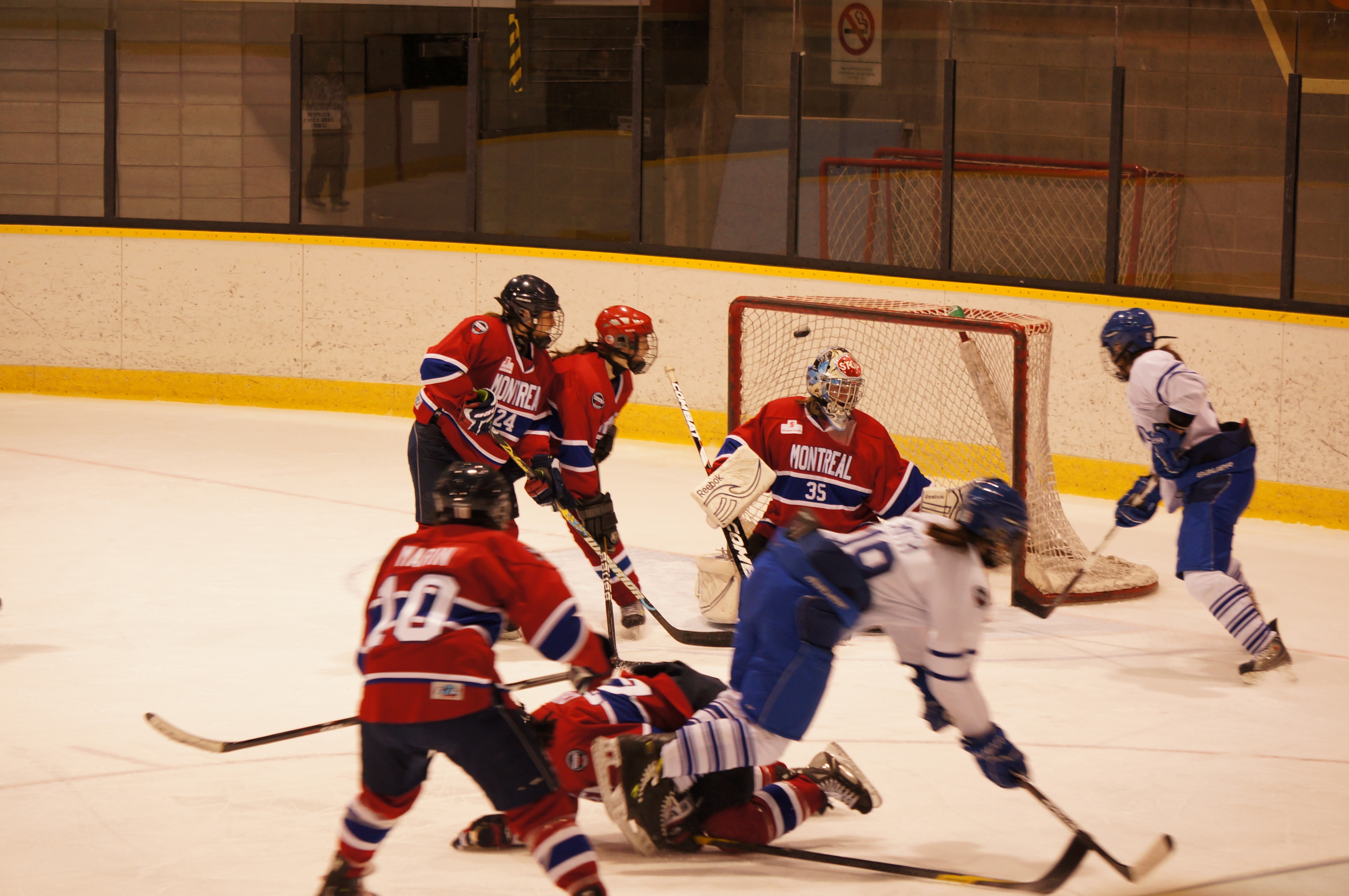 hockey féminin